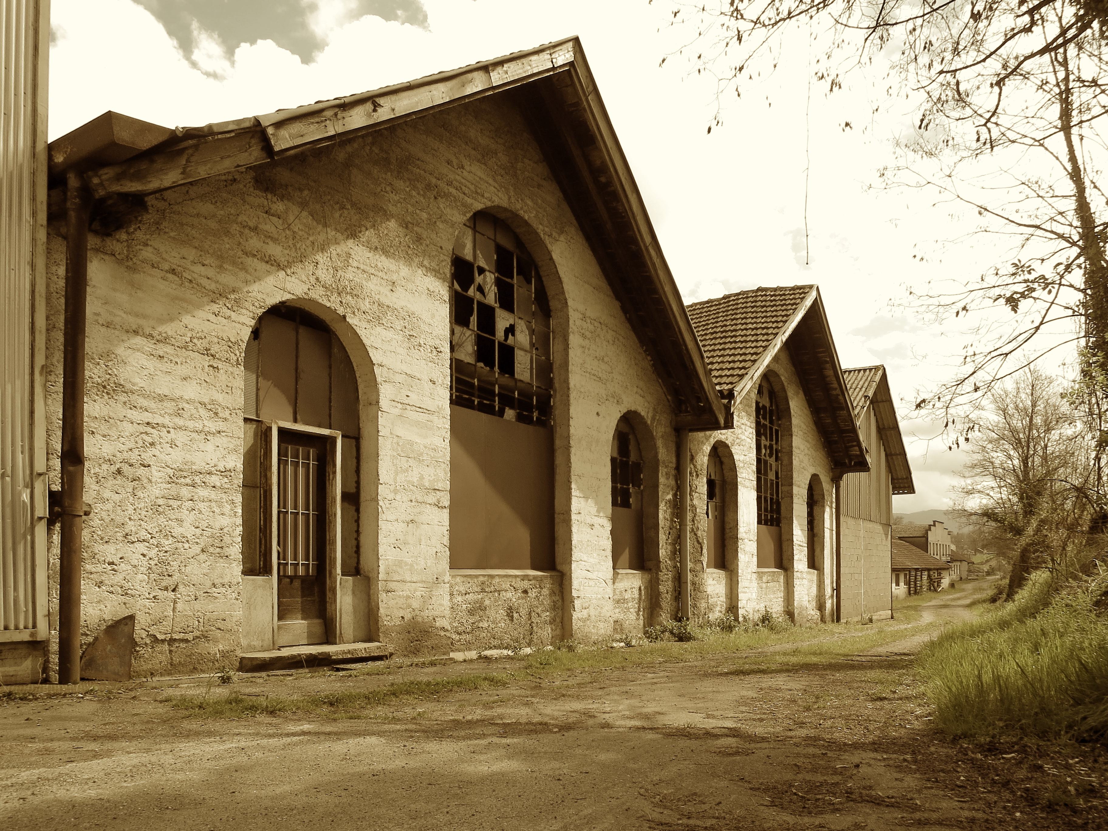 Saint-Lizier (Ariège, France) - Ancienne papeterie de Pourlande.